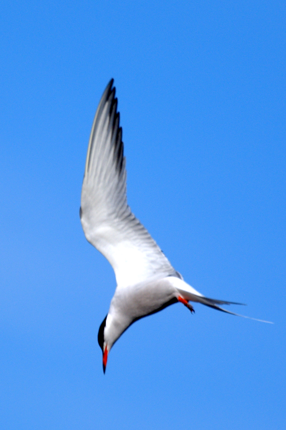 Kalatiira.